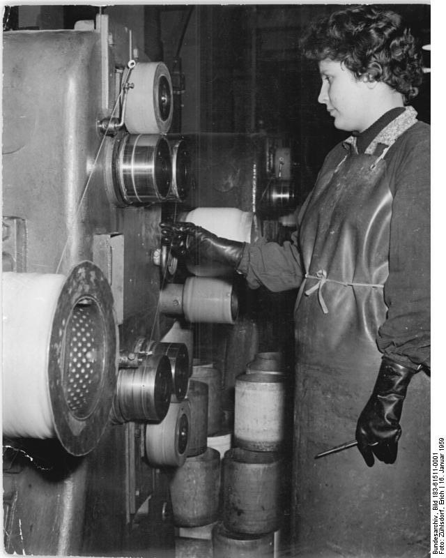 Zentralbild-Zühlsdorf Zü-Qu 16.1.1959 Perlondraht aus dem VEB Kunststoffwerk ACETA. Der VEB Kunststoffwerk ACETA in Berlin Rummelsburg produziert den begehrten Polyamiddraht, der als Kunststoff viele Verwendungsmöglichkeiten hat. Aus dem äusserst haltbaren und leichten Polyamiddraht werden u.a. Fischereinetze, Seile und Angelschnüre hergestellt. Der VEB ACETA bezieht den Grundstoff Aminocaprolaktan aus den Leuna-Werken "Walter Ulbricht". Dieses Aminocaprolaktan wird bei einer Hitze von 260°C polymerisiert. Durch diesen chemischen Prozeß entsteht die zähflüssige Perlonmasse. Durch eine Spritzdüse wird dann der Perlondraht produziert. UBz. Christa Knappe an der Streckmaschine. Mit dieser Maschine wird durch ein Streckverfahren der Perlondraht auf die gewünschte Stärke von 0,20 bis 0,90 mm Durchmesser gebracht.